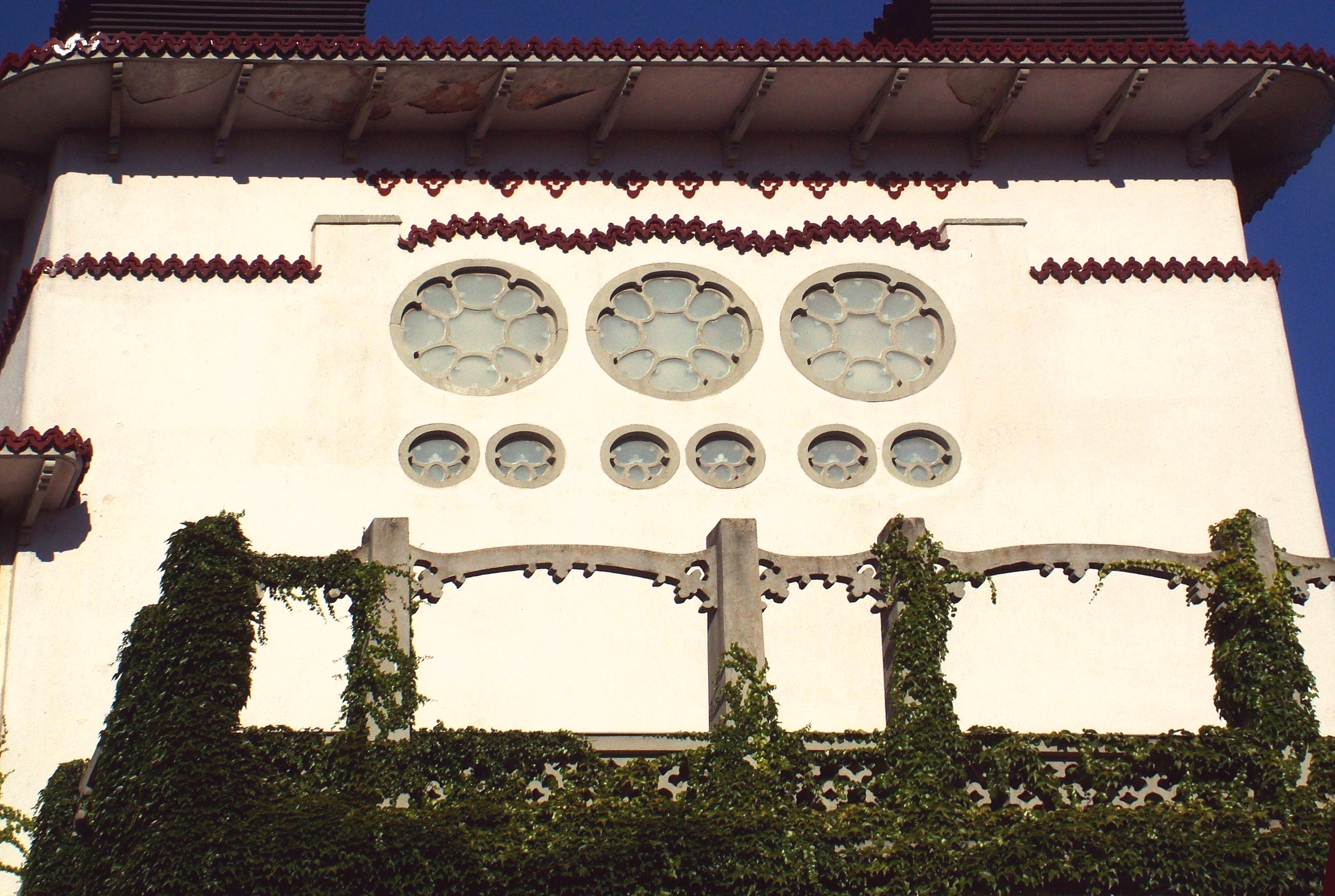 Petőfi Színház, Veszprém